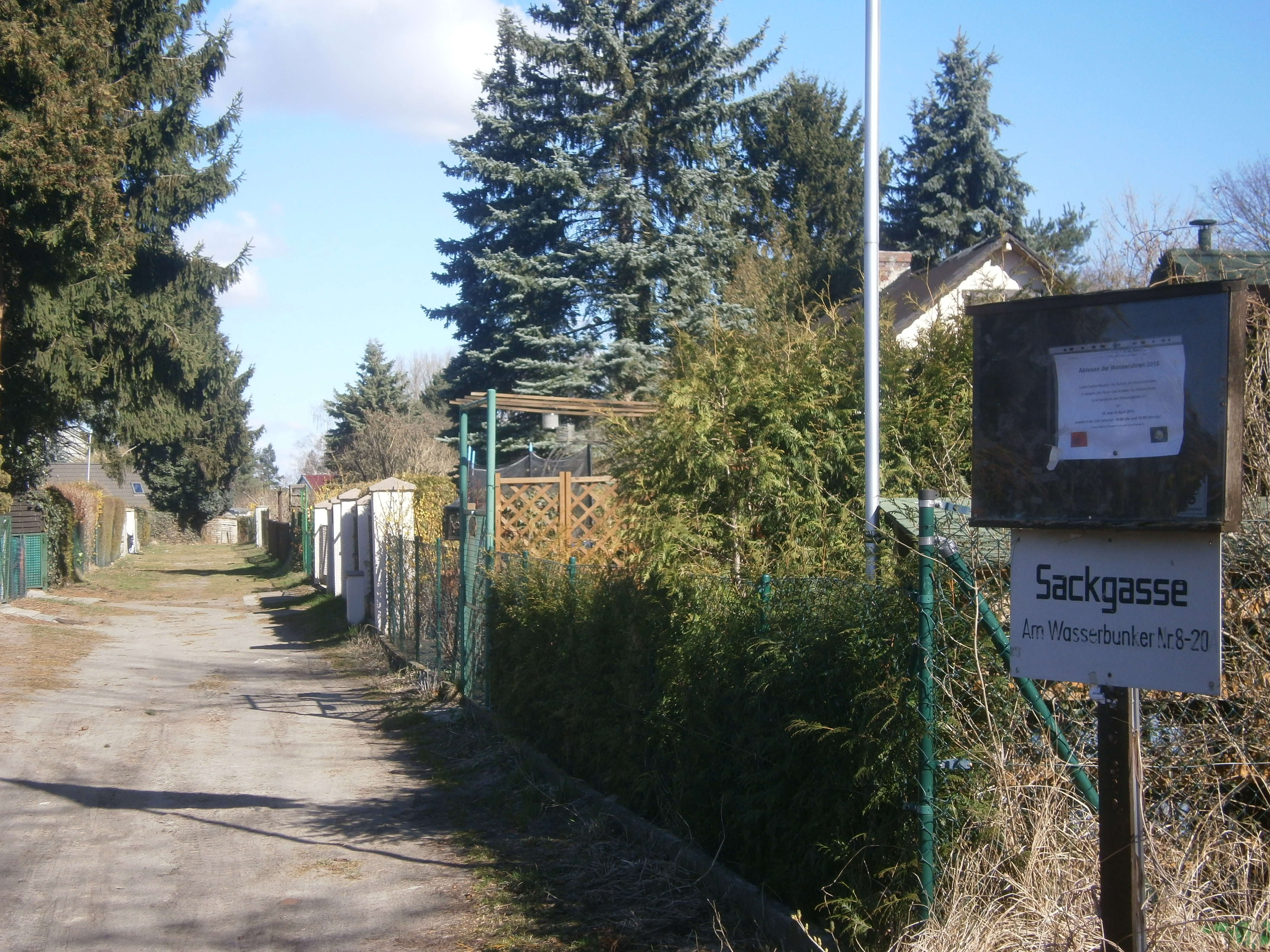 Die Kleingartenanlage Am Wasserbunker ist eine Gartenkolonie in Berlin-Tegel, Bezirk Reinickendorf, auf den Mäckeritzwiesen. Hier die Ostsackgasse in die Kolonie vom Uferweg am Hohenzollerkanal nach Norden.